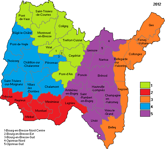 Circonscriptions de l'Ain en 2012